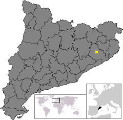 Localització de Santa Coloma de Farners. Location of Santa Coloma de Farners in Catalonia.